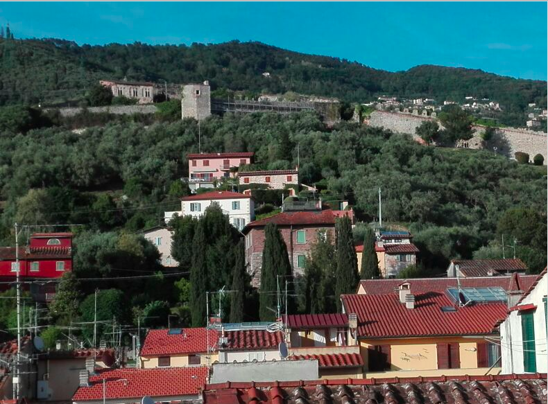 La Rocca di Sala in restauro